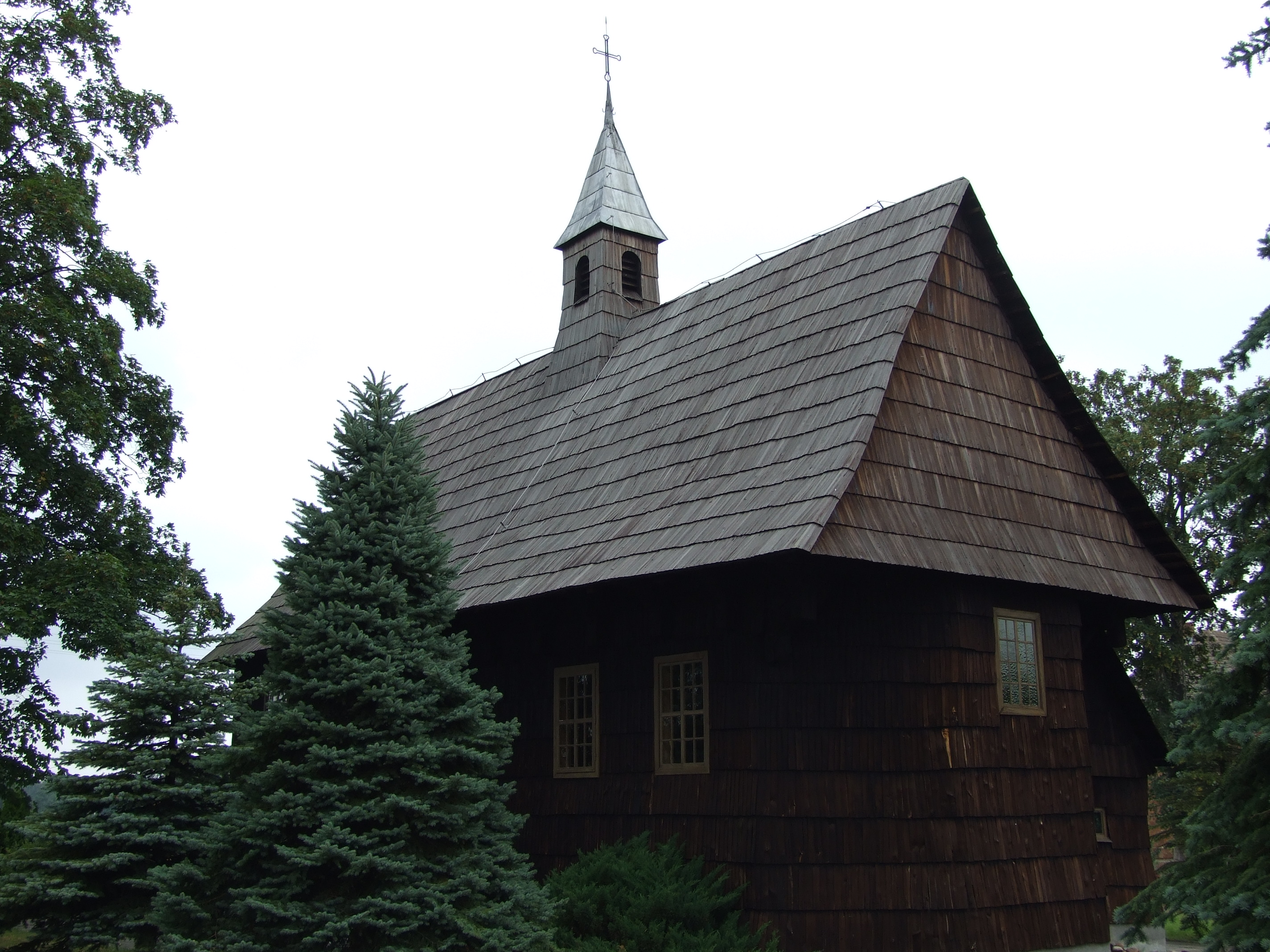 Kościół św. Antoniego z Padwy w Sowczycach